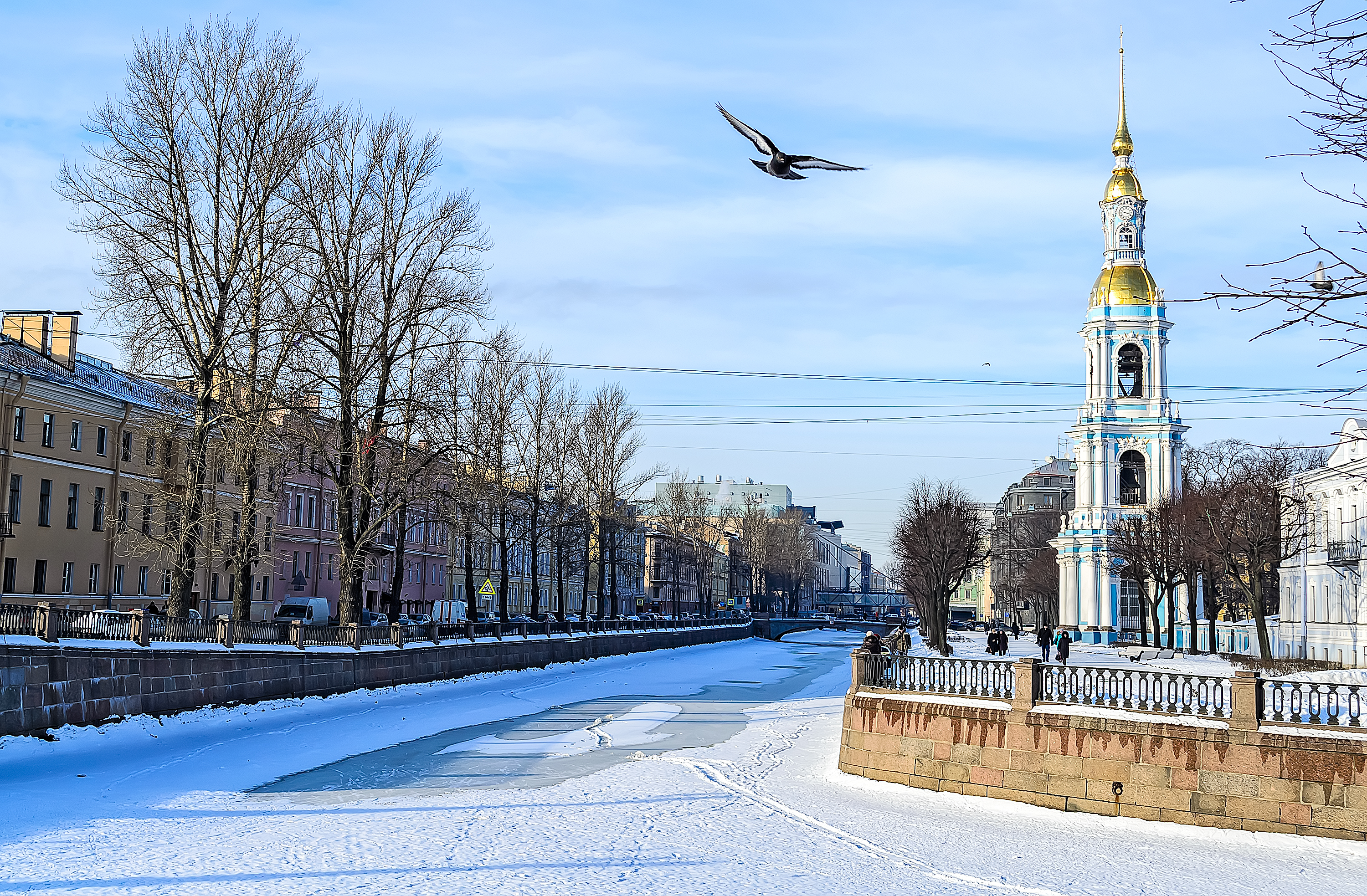 Никольский морской собор, колокольня